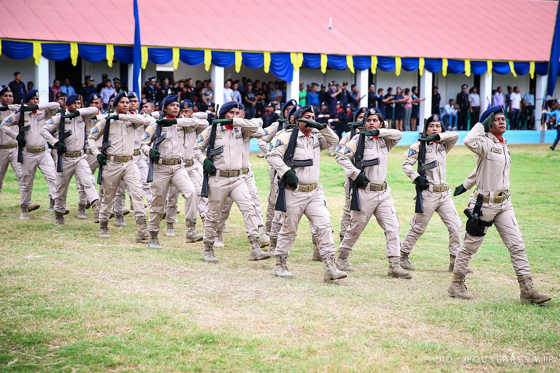 Cerimónia do 19.º Aniversário da Polícia Nacional de Timor-Leste